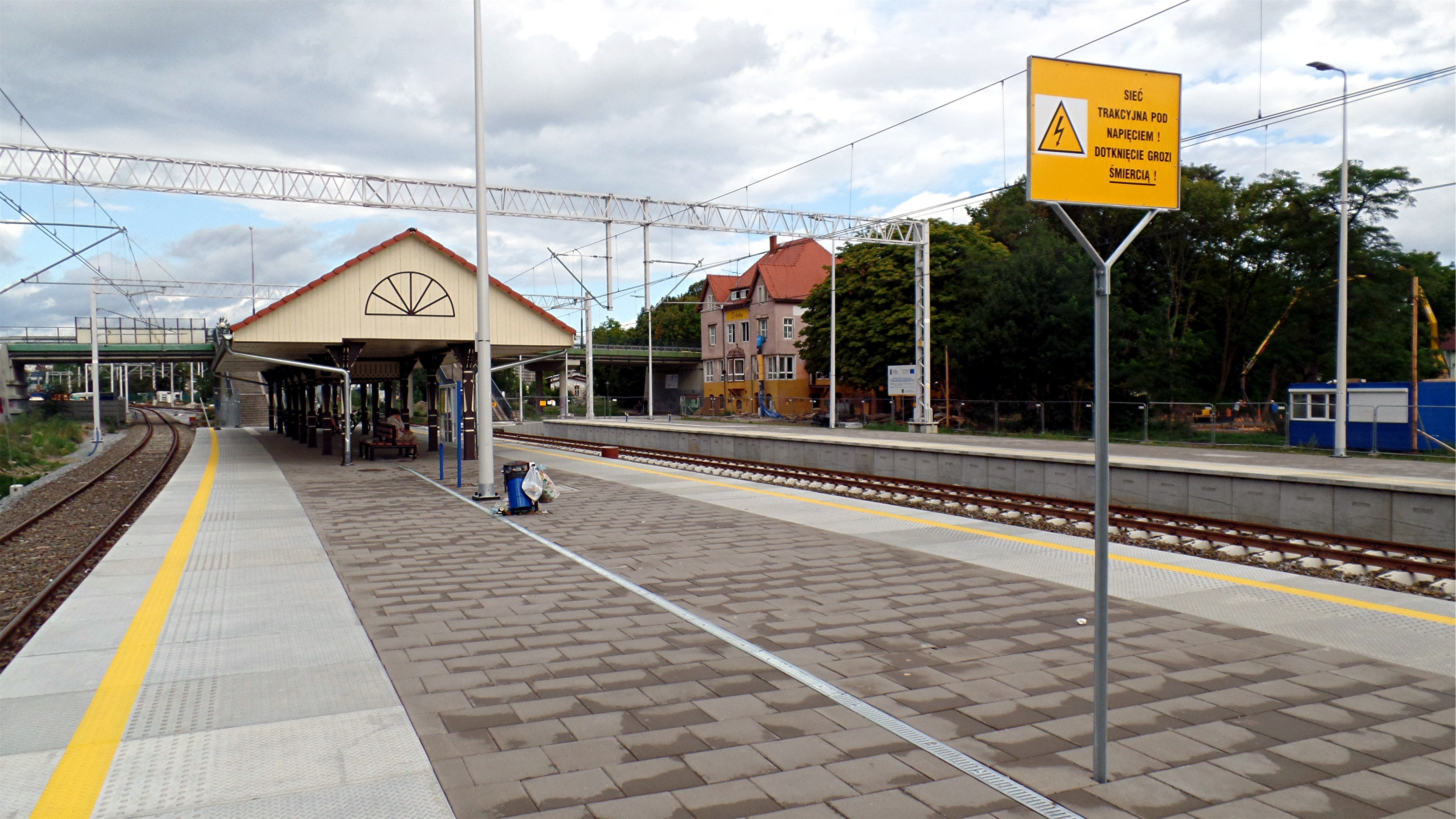 Bahnhof Ustka, Emppfangsgebäude hinten rechts